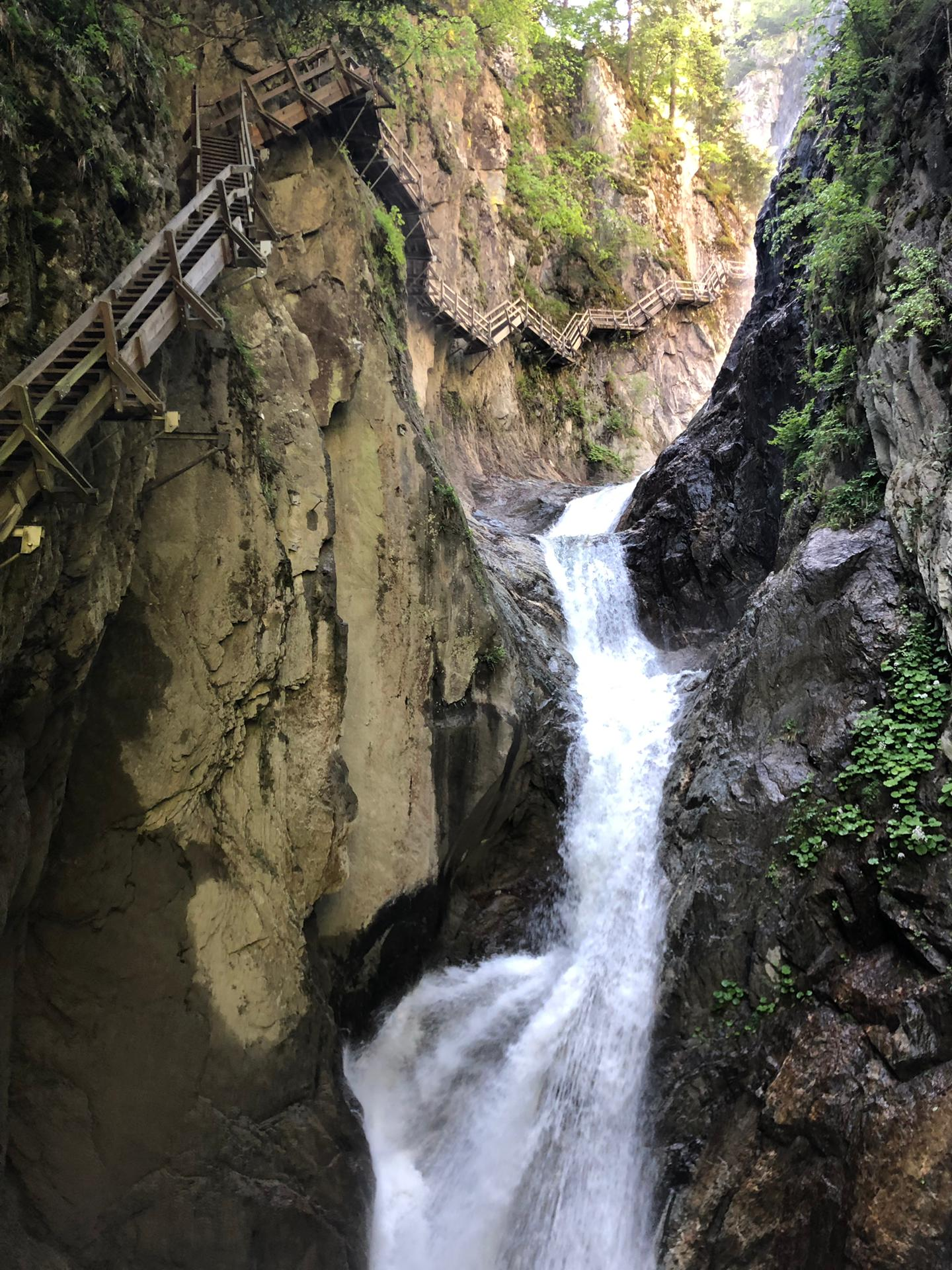 Vue de l'intérieur des Gorges du Durnand - Suisse - Valais - Bovernier